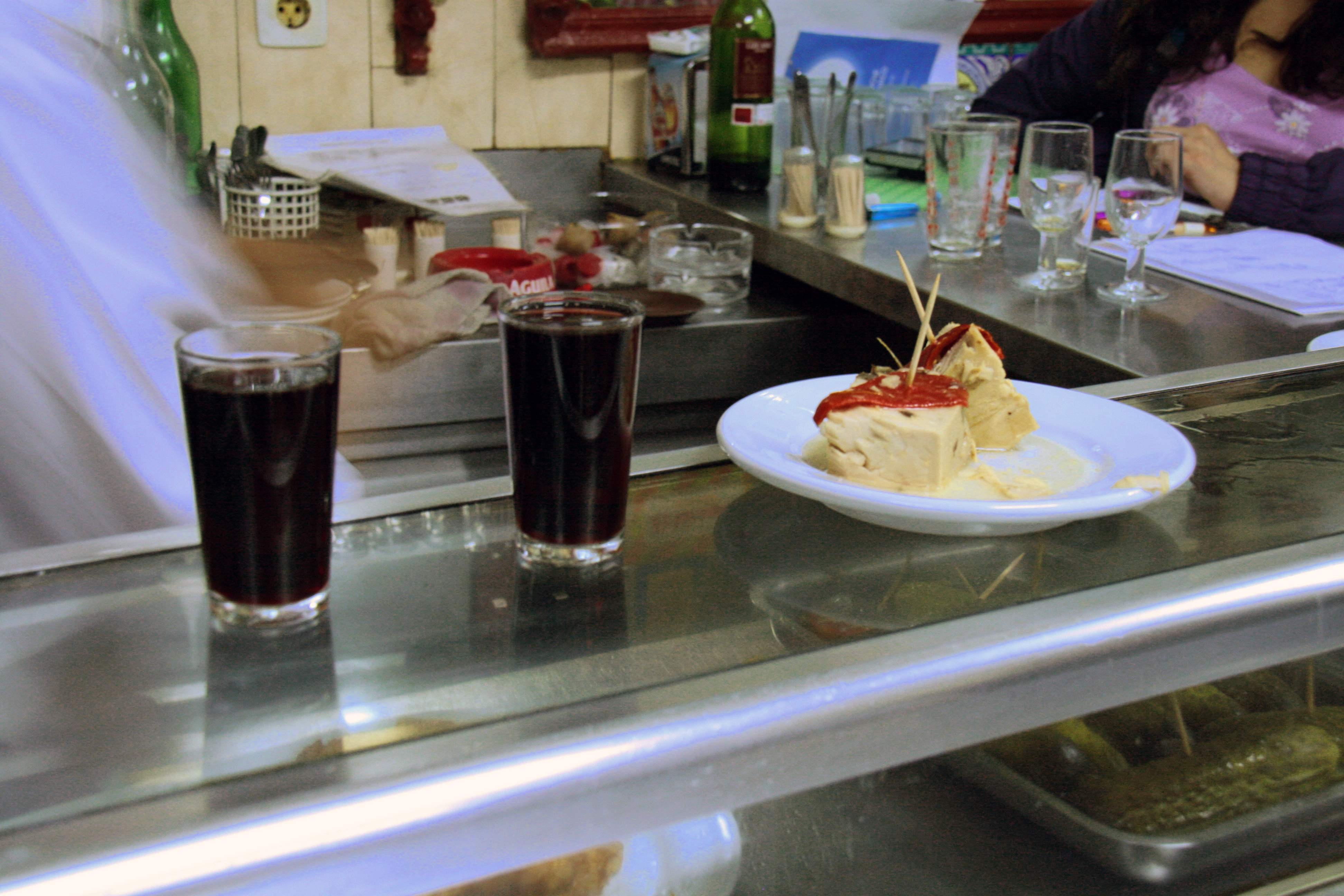 Dos chatos con el consiguiente taco de bonito (Casa de las Torrijas)